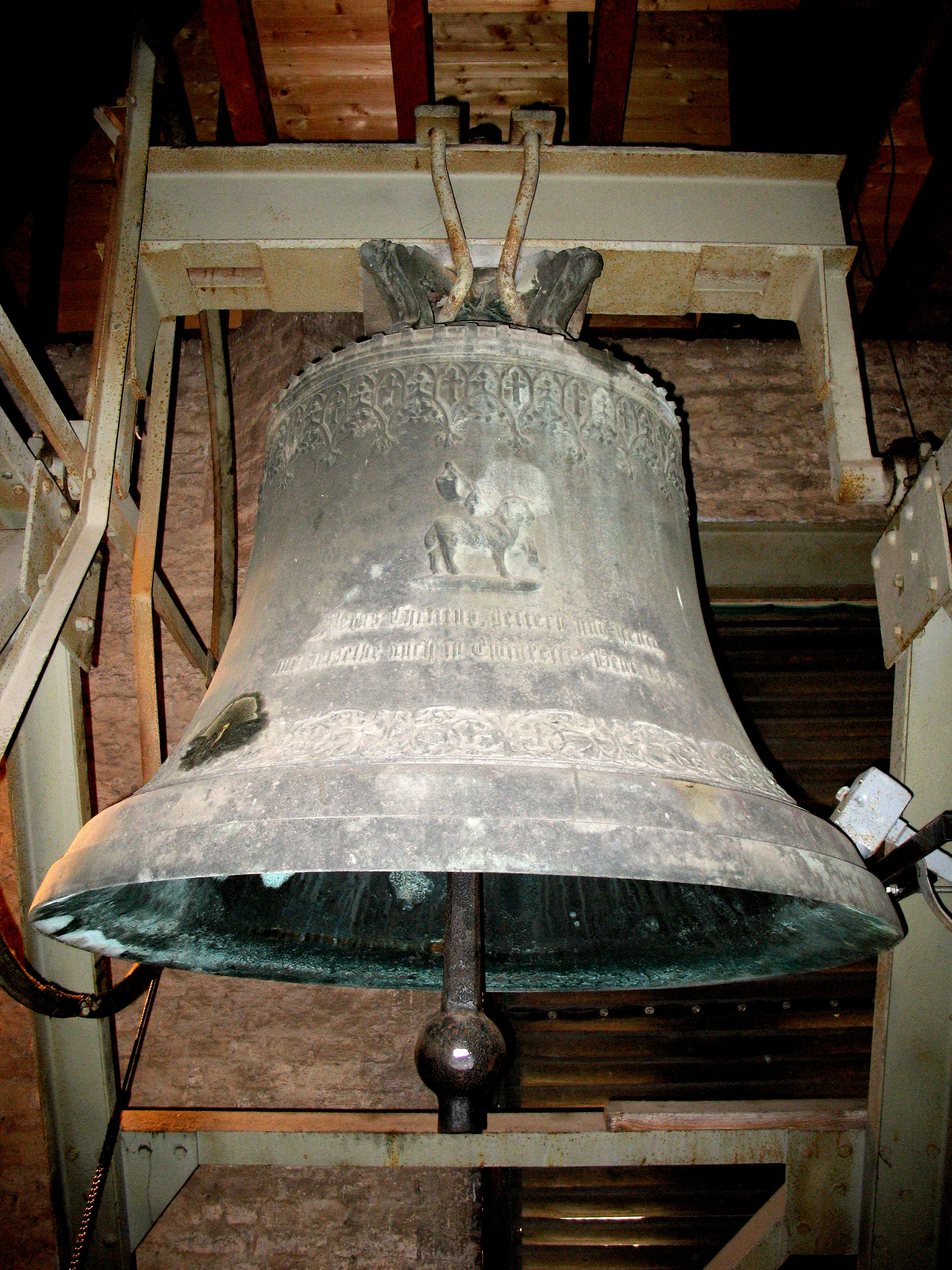 D'-Glocke des ehemaligen B-Dur-Bronzegeläutes der Petrikirche zu Chemnitz. Hier im gekröpften Schilling'schen Stahljoch im Turm der Chemnitzer Schloßkirche.